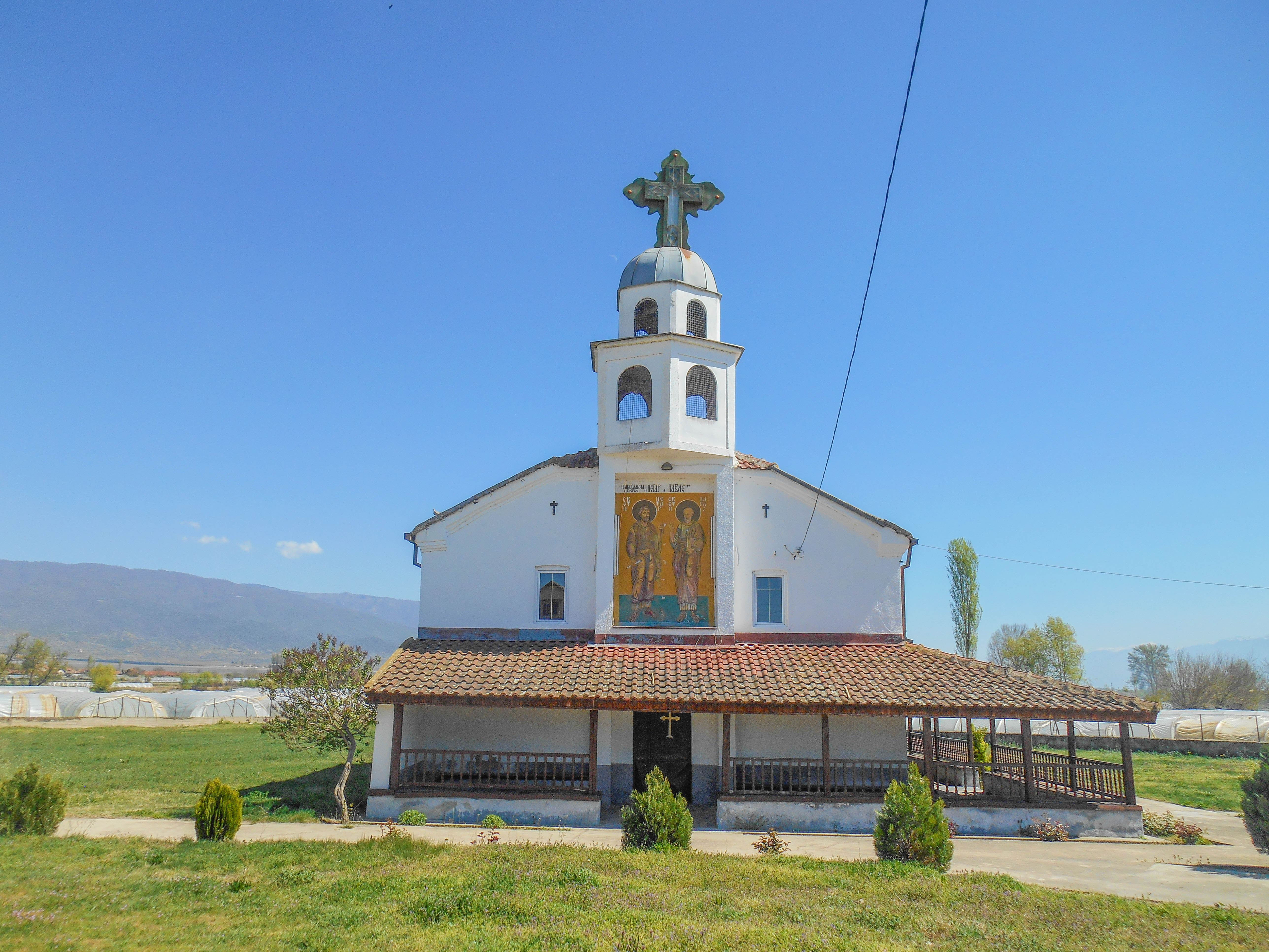 Црква „Св. Петар и Павле“ - Сарај